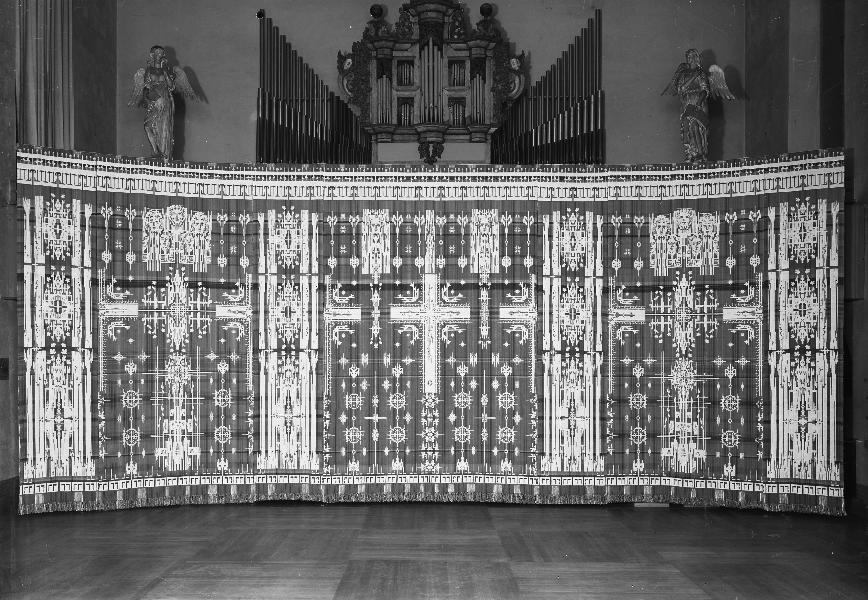 Bonad, utförd av Handarbetets Vänner. Kategori: (07) Textilier Bonad, utförd av Handarbetets Vänner.